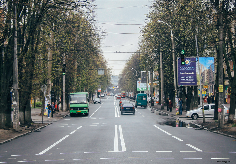 весна на вулиці Тітова